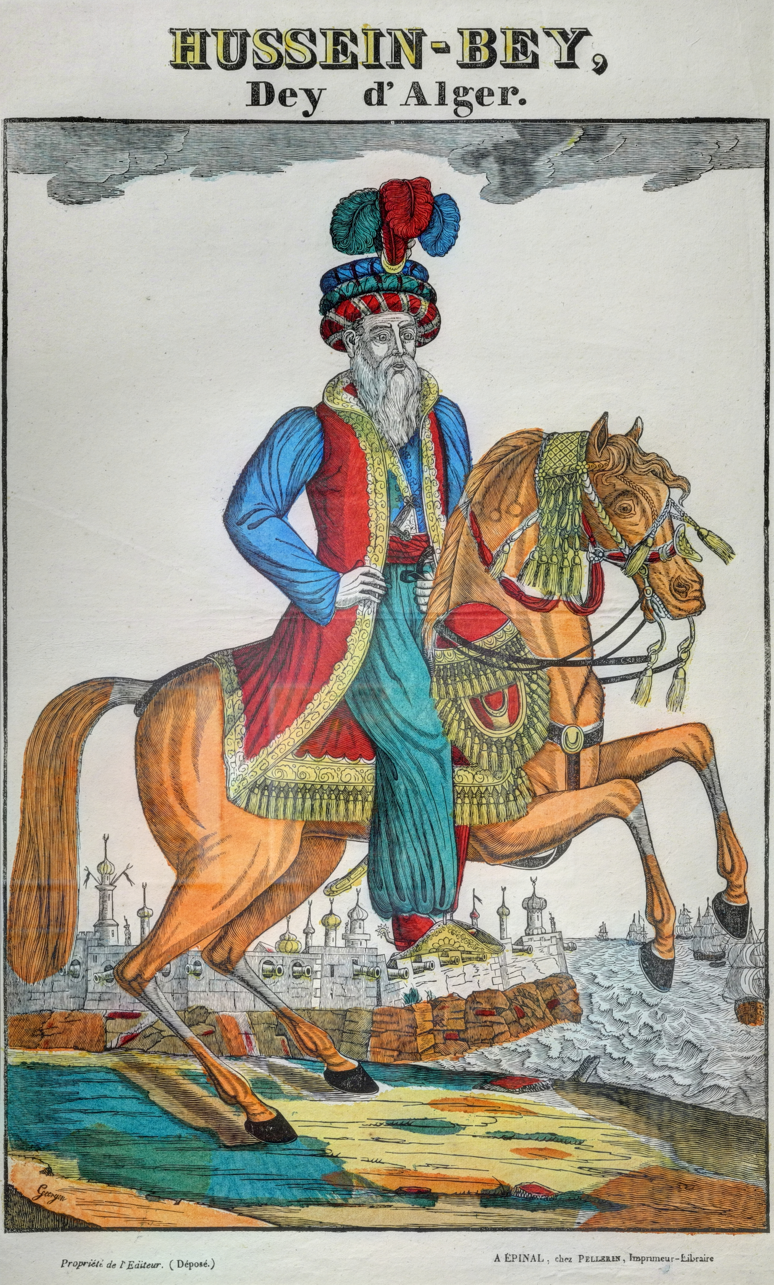 Musée d'Histoire : Hussein-Bey, Dey d'Alger (HDR). Pellerin, imprimeur ; François Georgin, graveur (1801 - 1863). XIXe siècle, estampe sur papier colorié au pochoir, Épinal Coll. Musée de l'image, Épinal, N°inv. D 996.1.7687 C